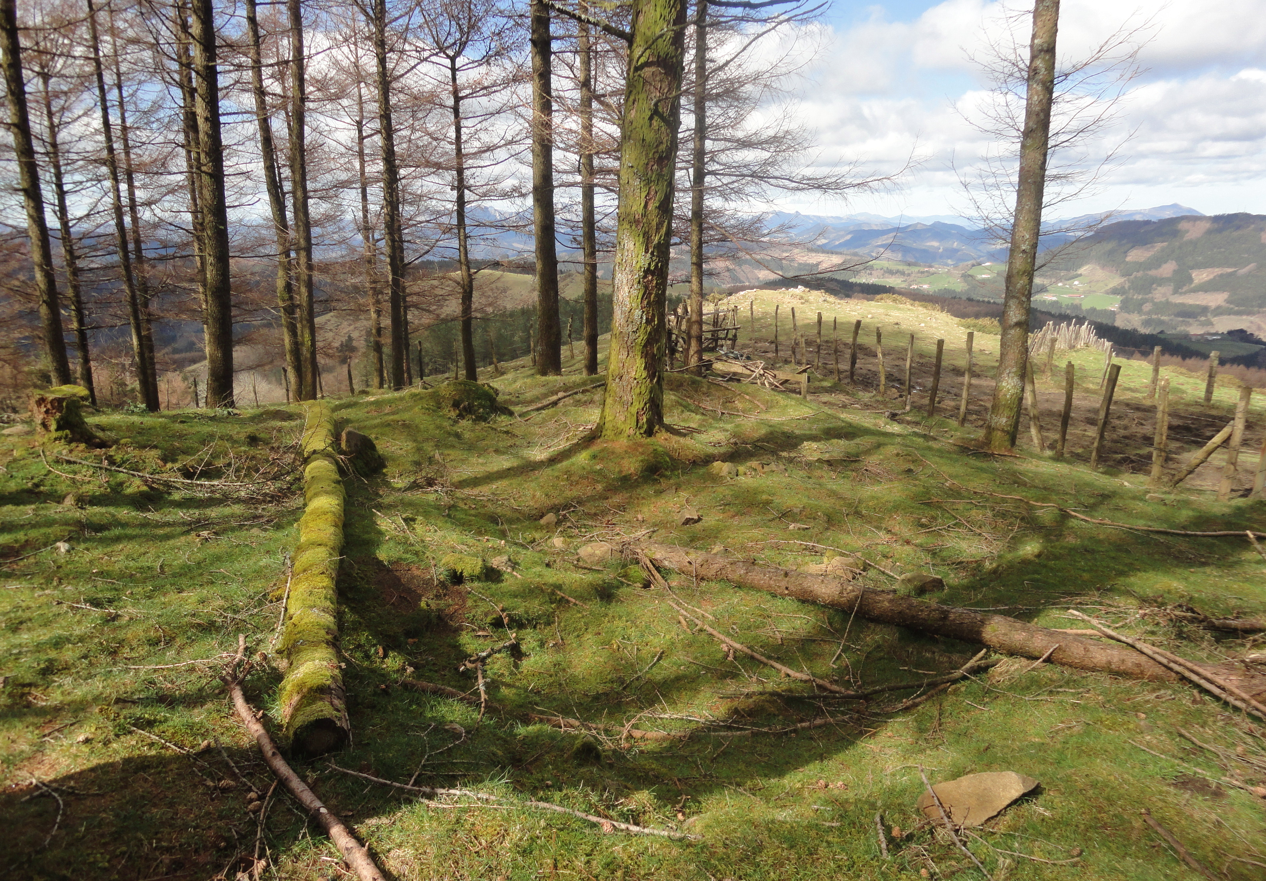 Iruarrieta I trikuharria - Azkoitia